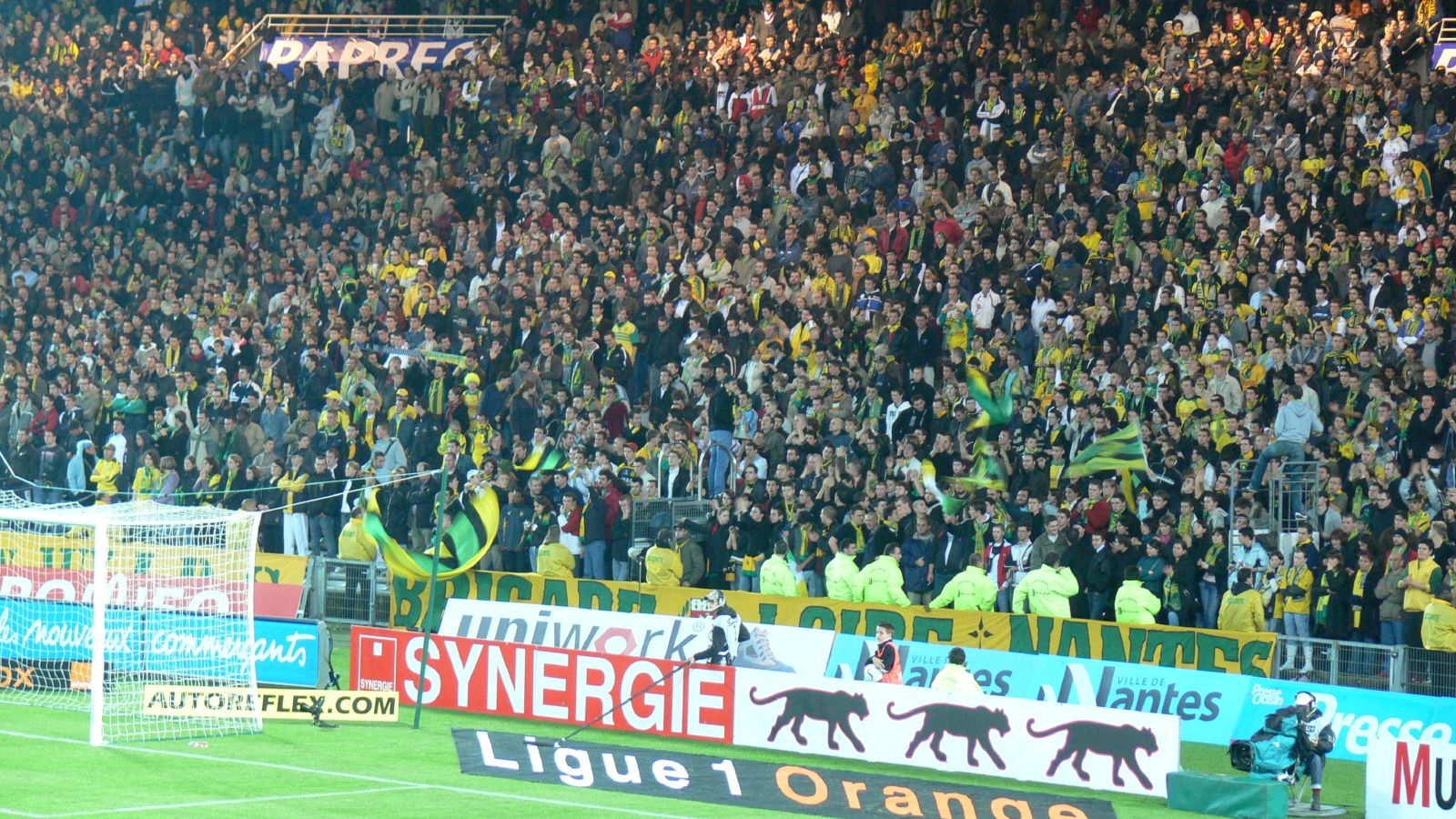 Supporters du FC Nantes Stade de la Beaujoire: FC Nantes / AS Saint-Etienne